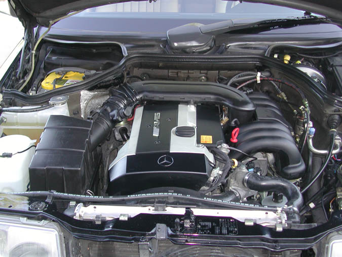 1995 Mercedes M104 AMG 3.6-liter engine